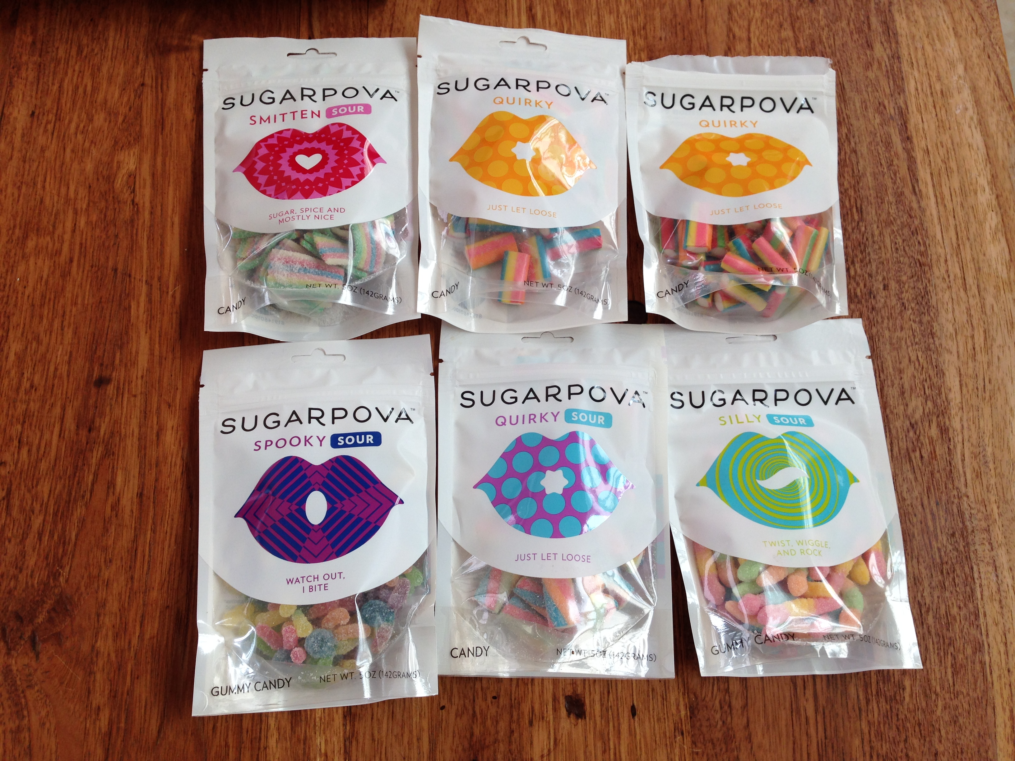 6 zakjes Sugarpova